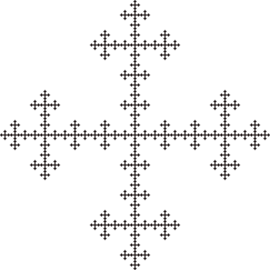 Cuarta iteración de la construcción del fractal de Vicsek en forma de cruz. Generado por un sistema de funciones iteradas (IFS).